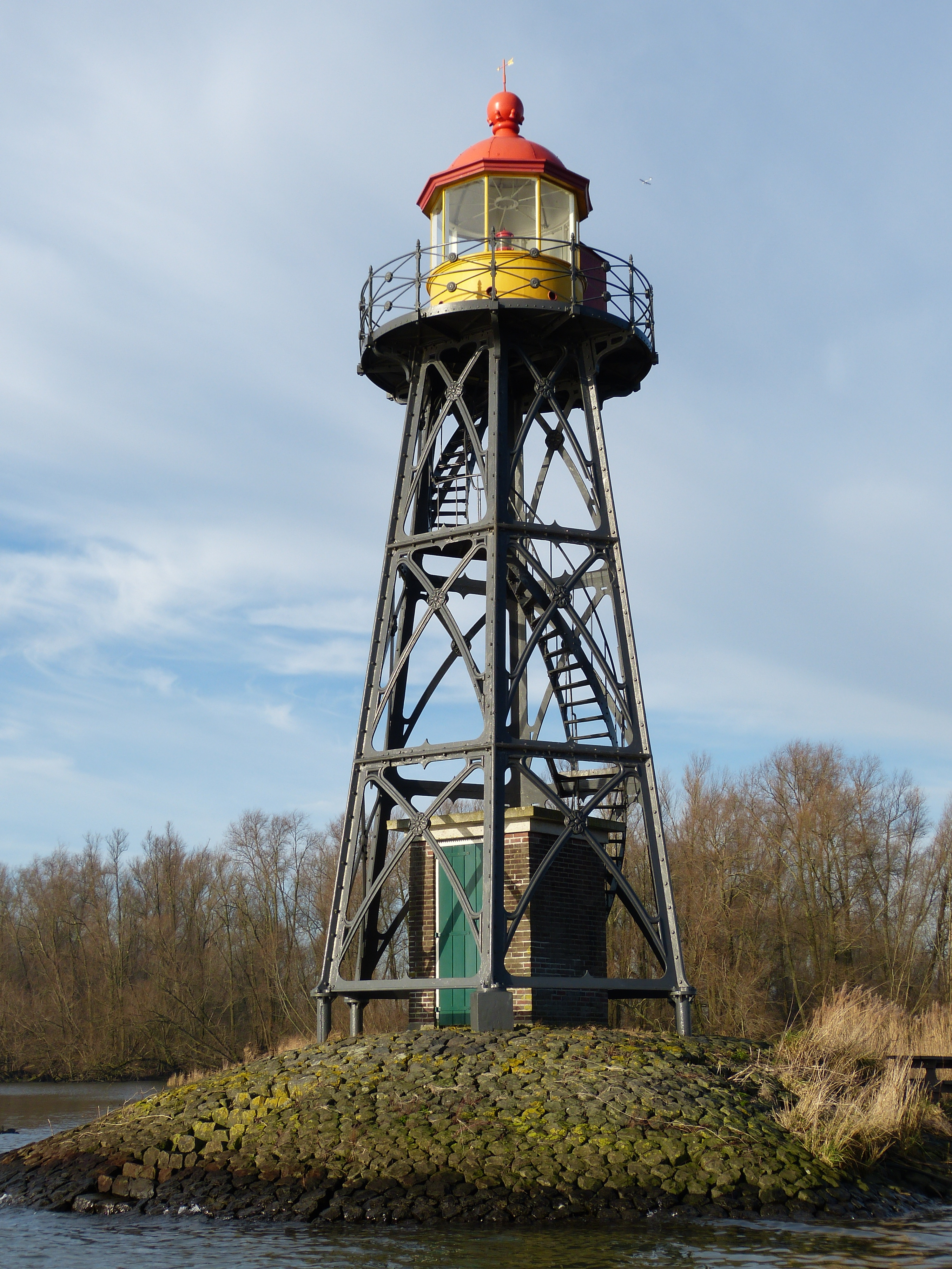 Lichtopstand Strijensas